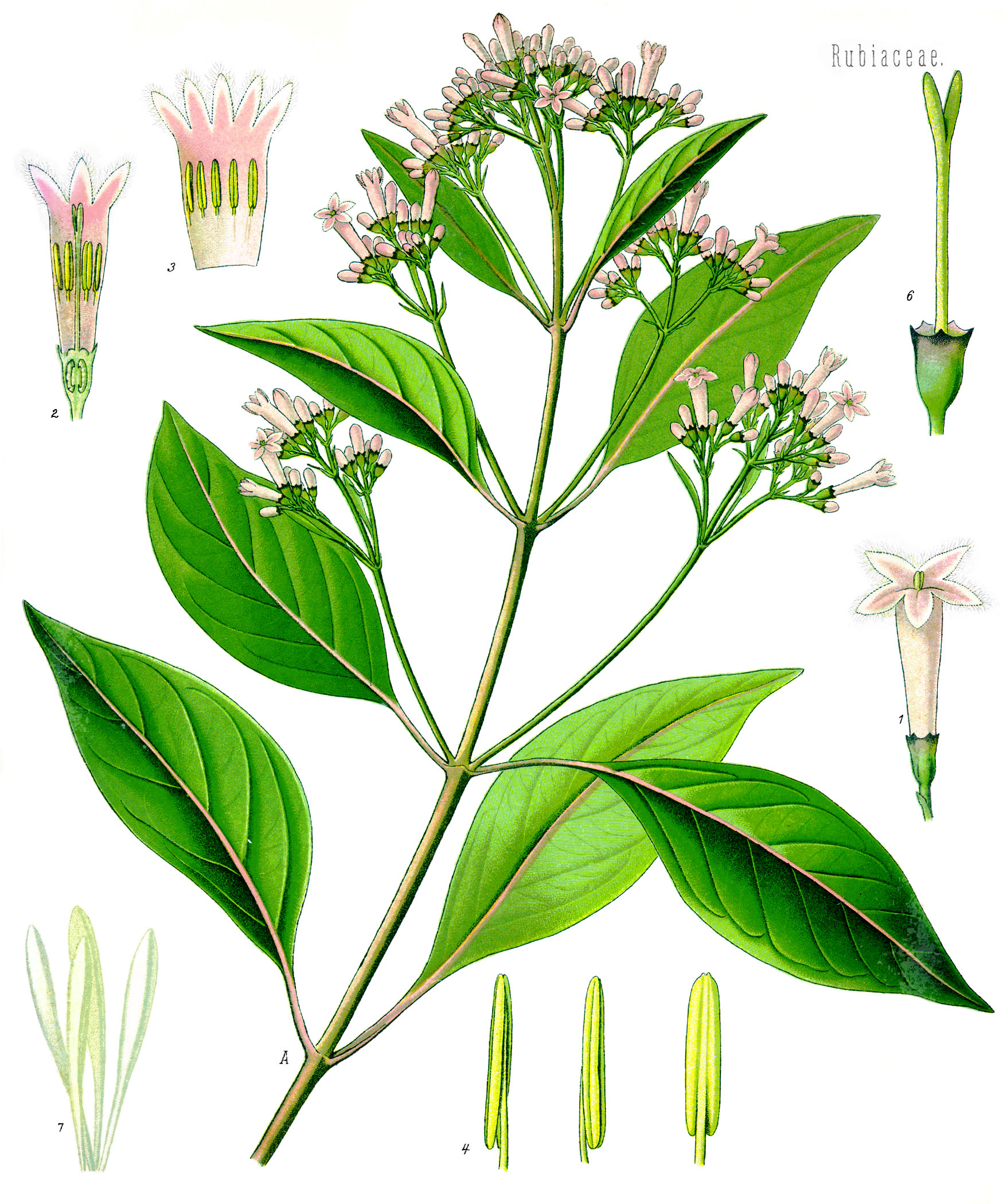 China. Cinch. officinalis: A blühender Zweig, natürl. Grösse; 1 Blüthe, vergrössert; 2 dieselbe im Längsschnitt, desgl.; 3 aufgeschnittene Kronenröhre, desgl.; 4 Staubgefässe von verschiedenen Seiten, desgl.; 5 Pollen, desgl.; 6 Kelch mit hervorragendem Griffel und Narbe, desgl.; 7 Papillen des Blumensaumbartes, desgl.